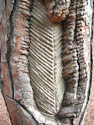 Una incisione su un pino domestico per la resinazione Foto di berlinerBlues 14:56, 27 ago 2006 (CEST)